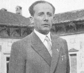 Il giornalista e storico italiano Pio Bondioli.